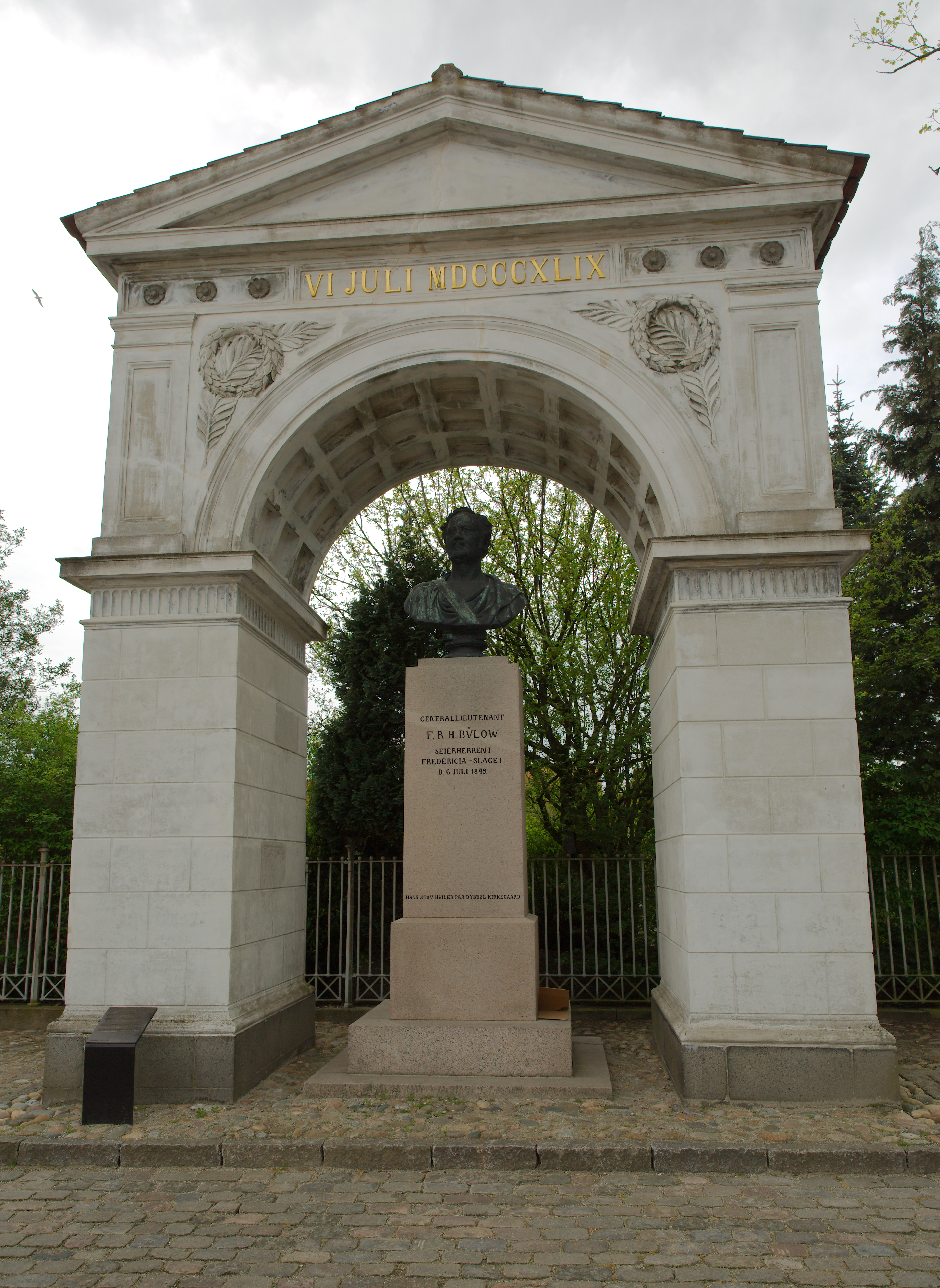 statue af Frederik Rubeck Henrik von Bülow i Fredericia udført af Herman Wilhelm Bissen